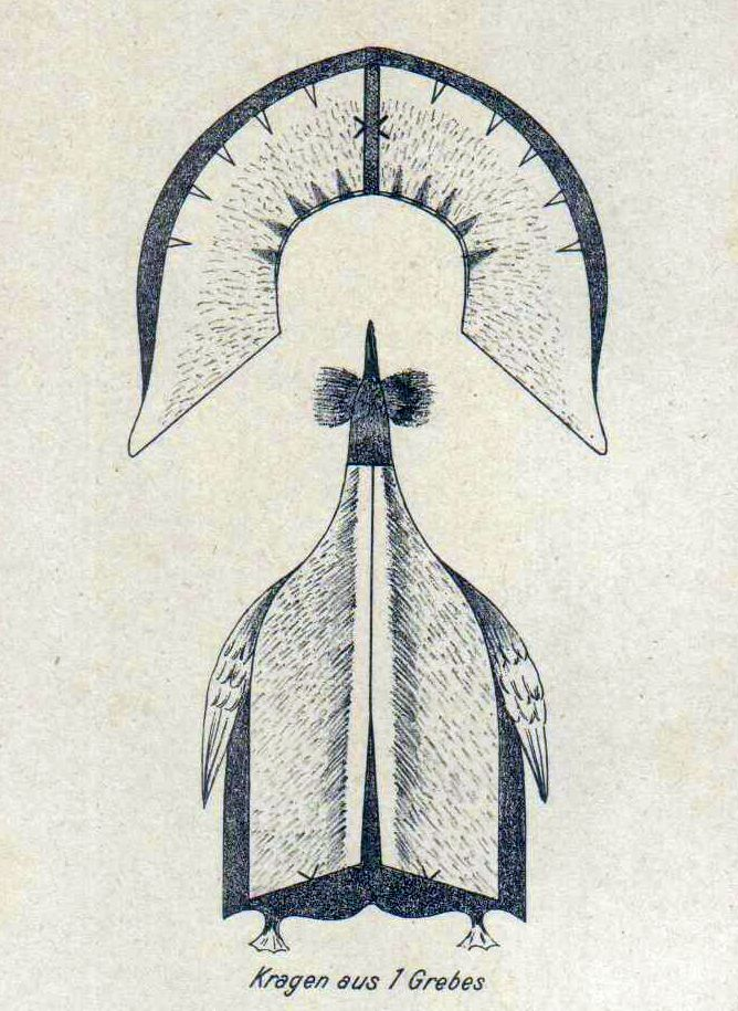 Graphics for Furriers Kragen aus 1 Grebes